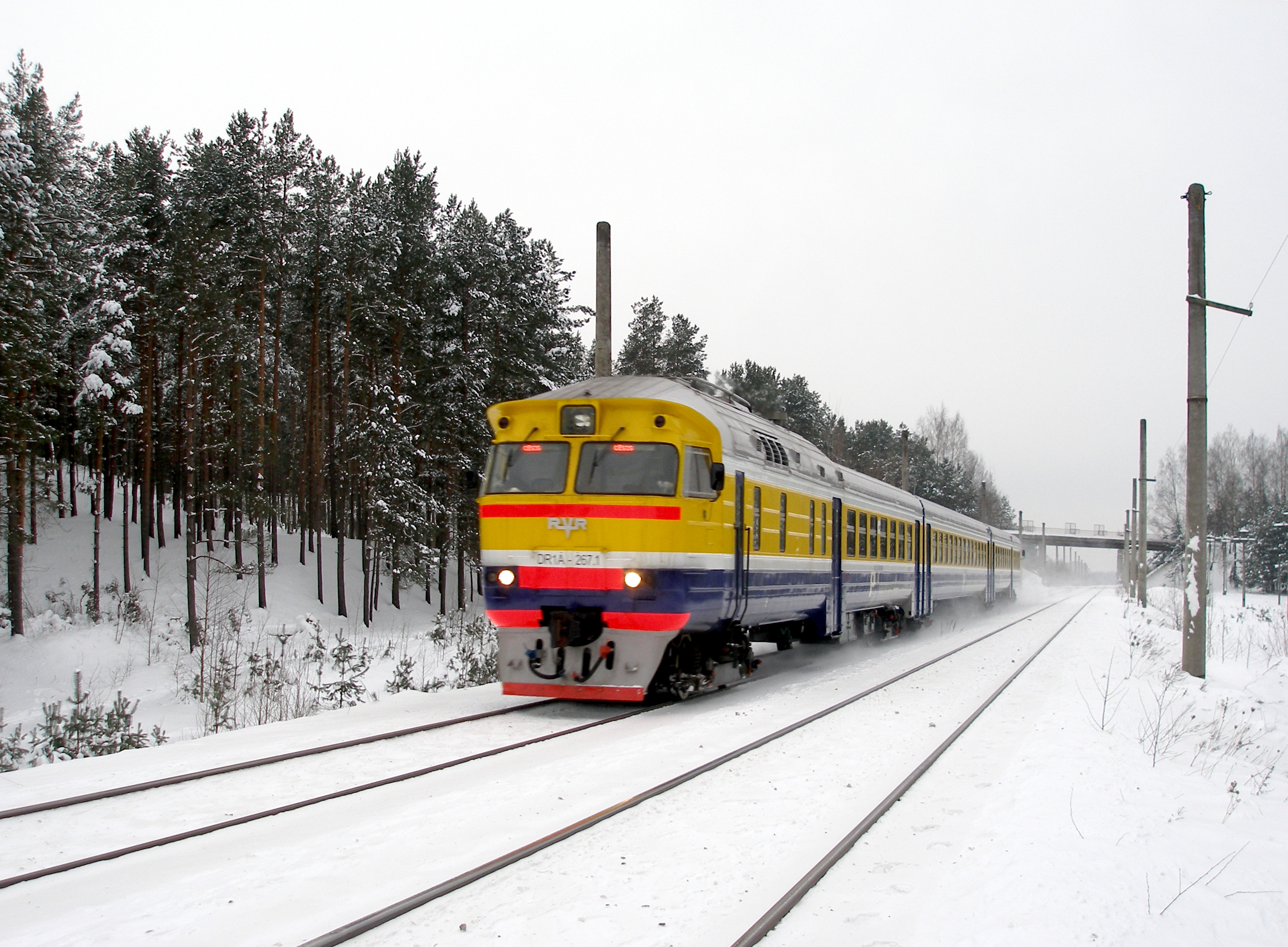 Дизельный поезд ДР1A-267 близ путепровода по Яунциема гатве